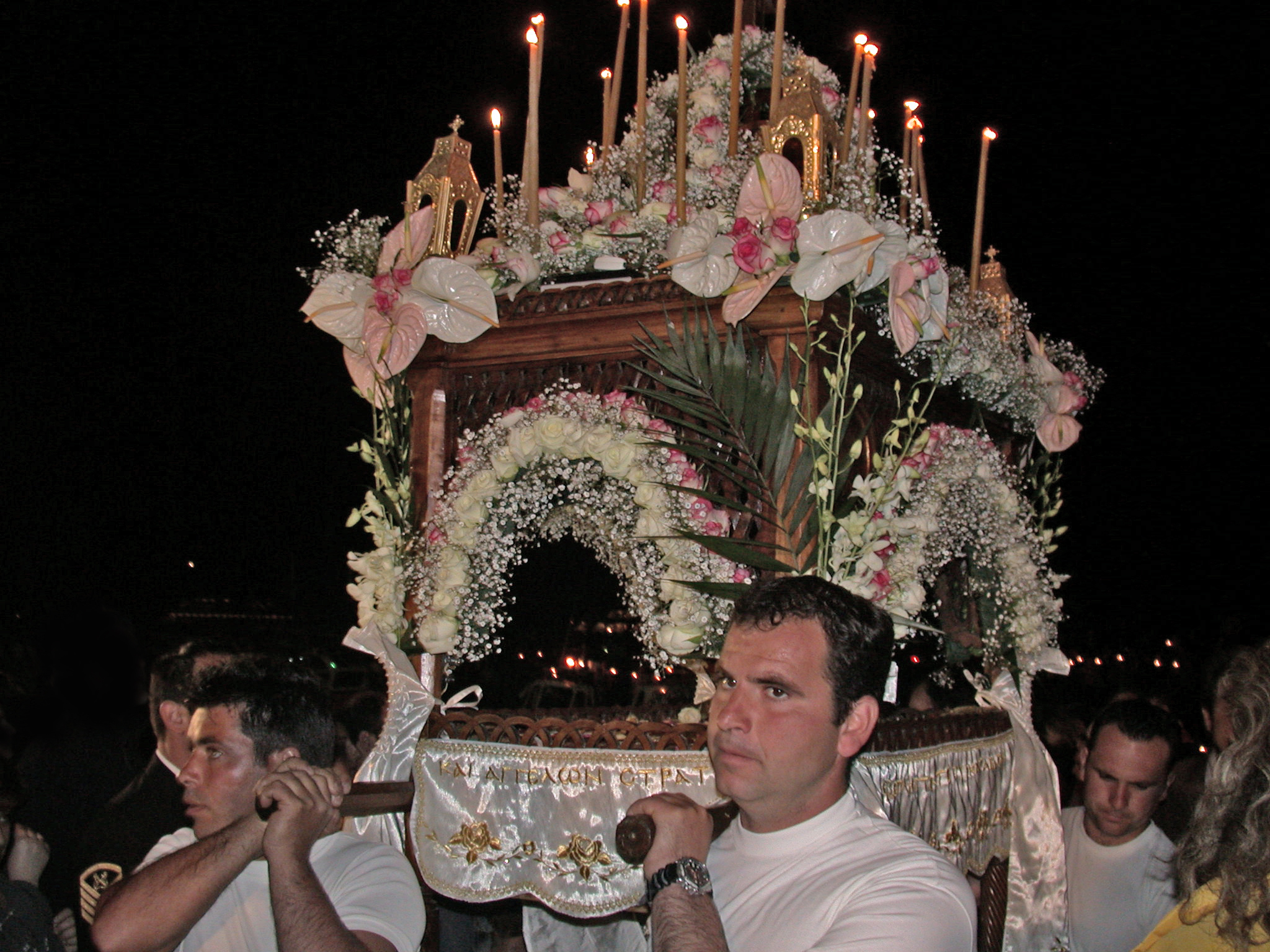 Grecia, isola di Idra, Venerdì Santo, processione dell'Epitaffio a Kalami